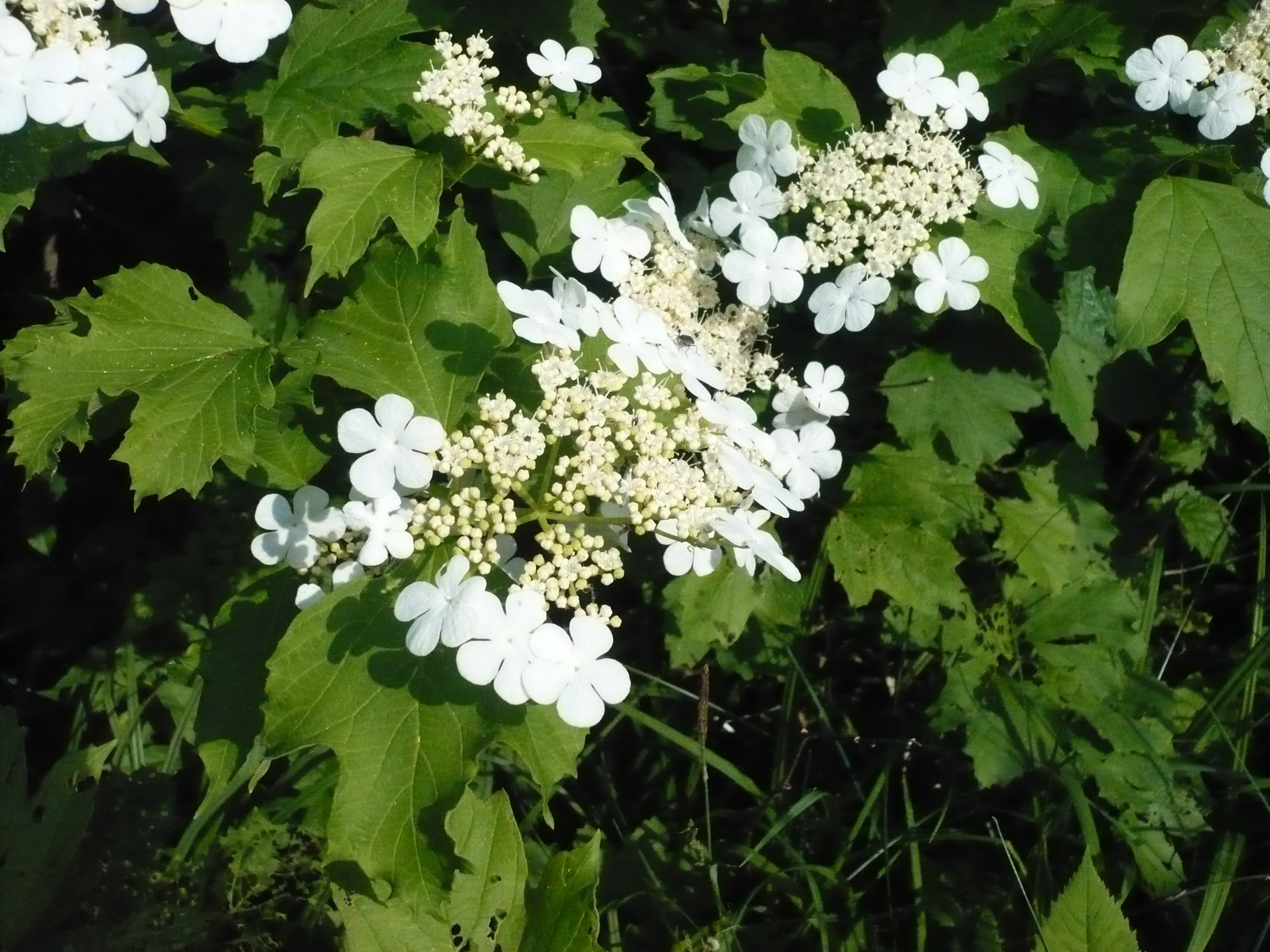 Калина обыкновенная. Соцветие. Окрестности Пензы, Россия.